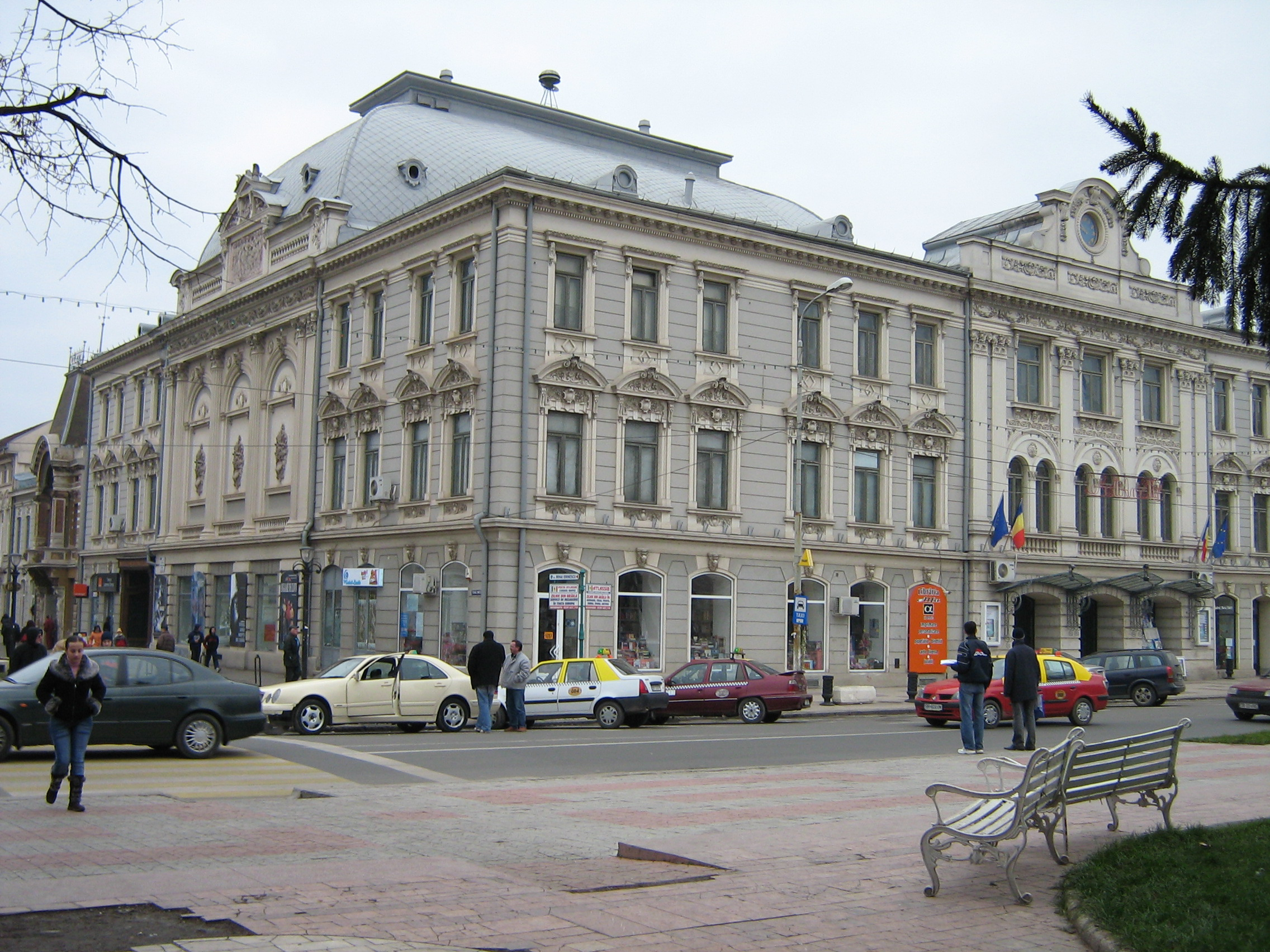 Maria Filotti Theatre, in Brăila